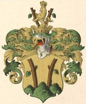 Stackelbergi suguvõsa aadli- ja parunivapp